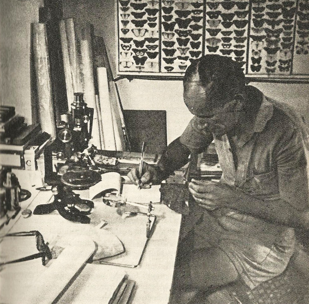 Dr. Ferencz Károly dzsungellaboratoriumában